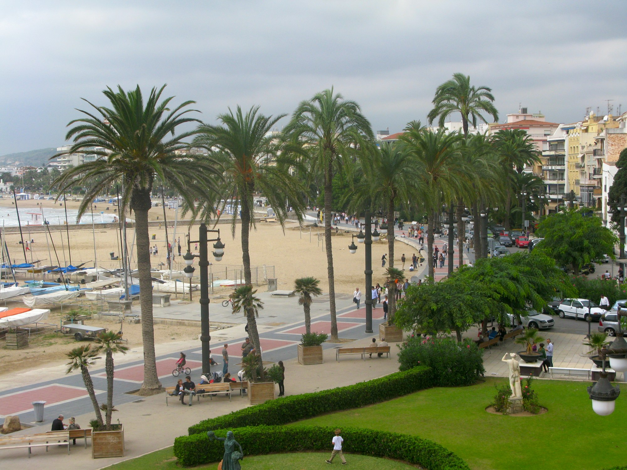 Stiges Catalogne 290